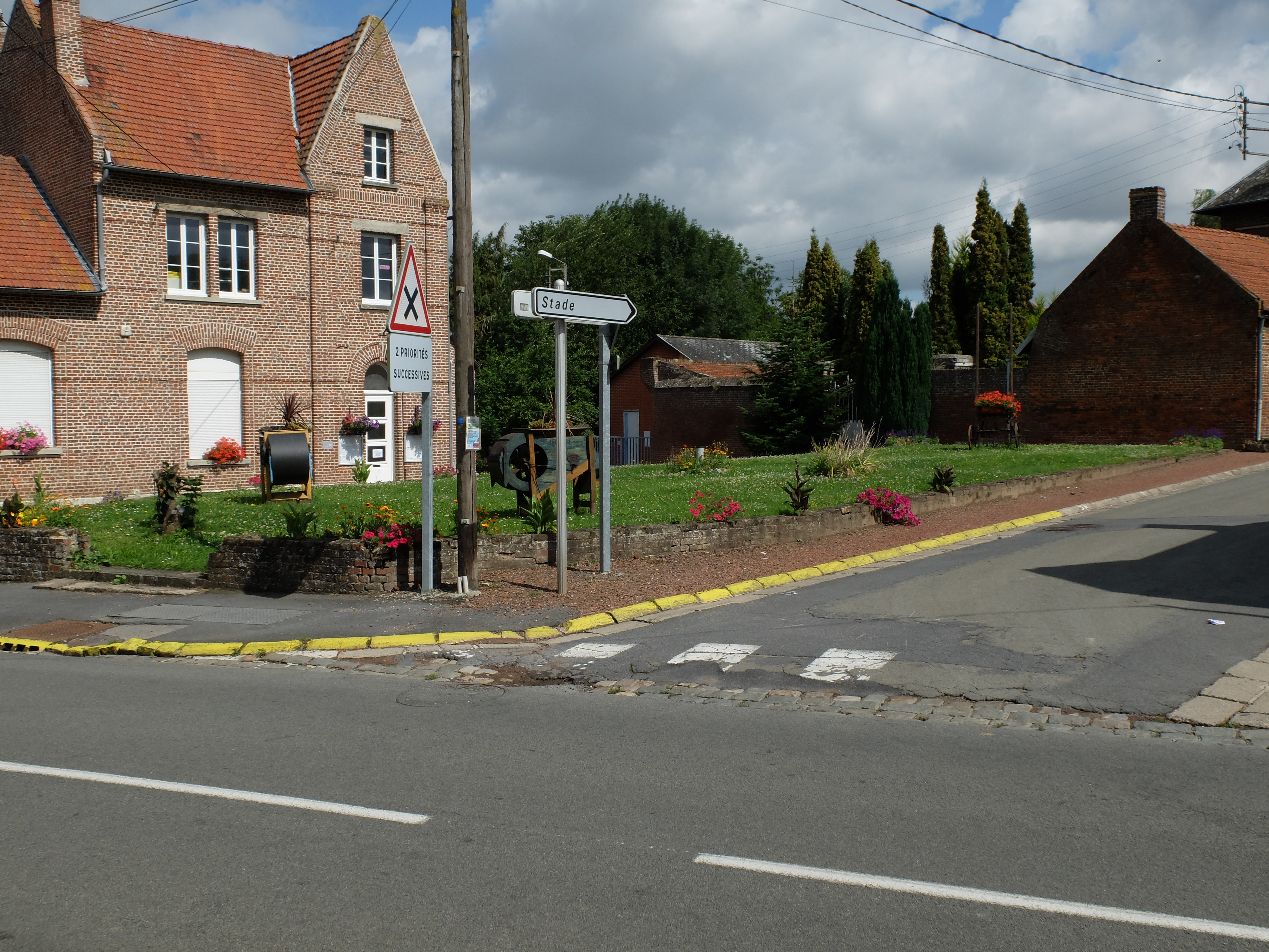 Vue d'un petit espace vert d'Abancourt (Nord) près de la mairie.